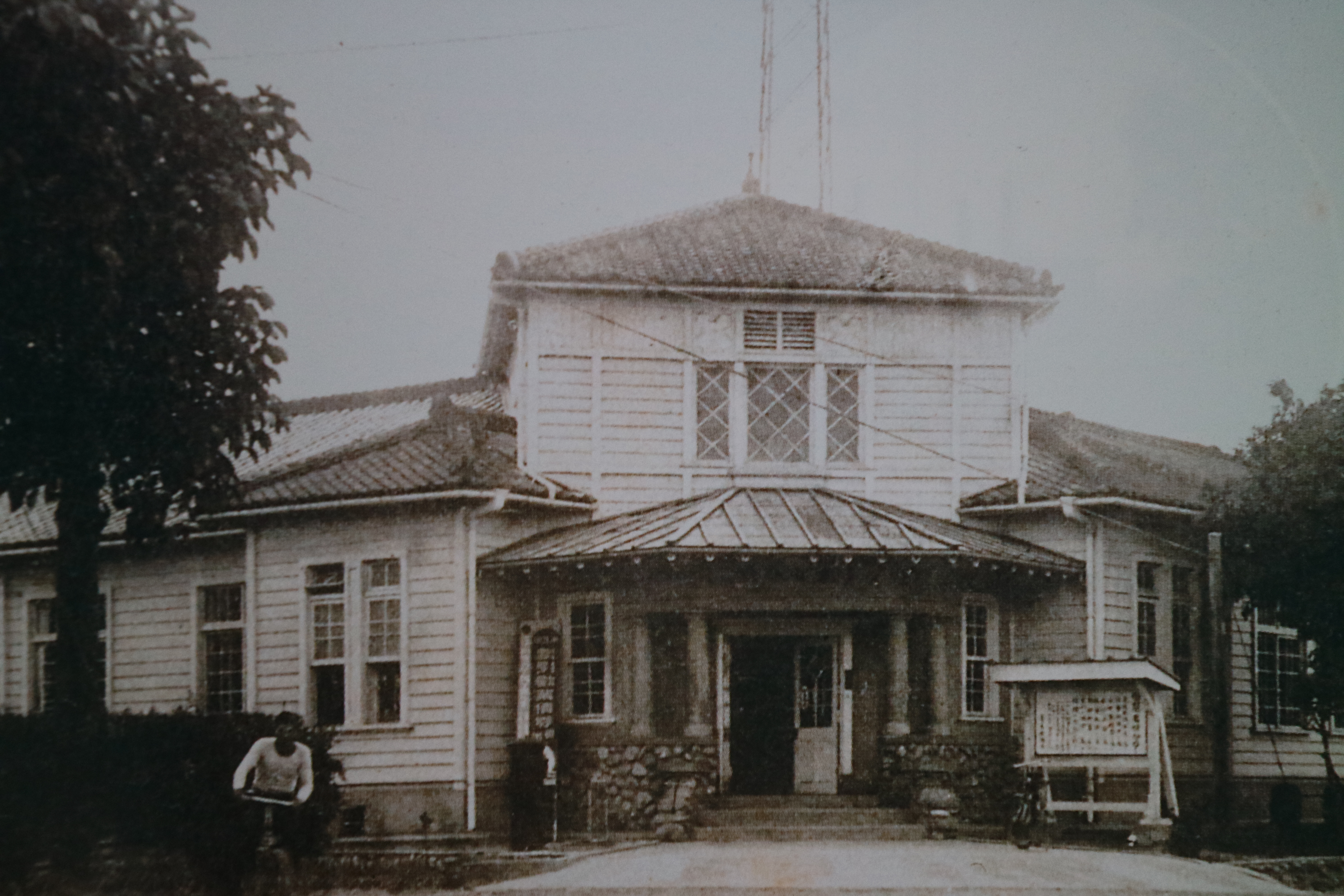 臺灣日治時期臺東郵便電信局。